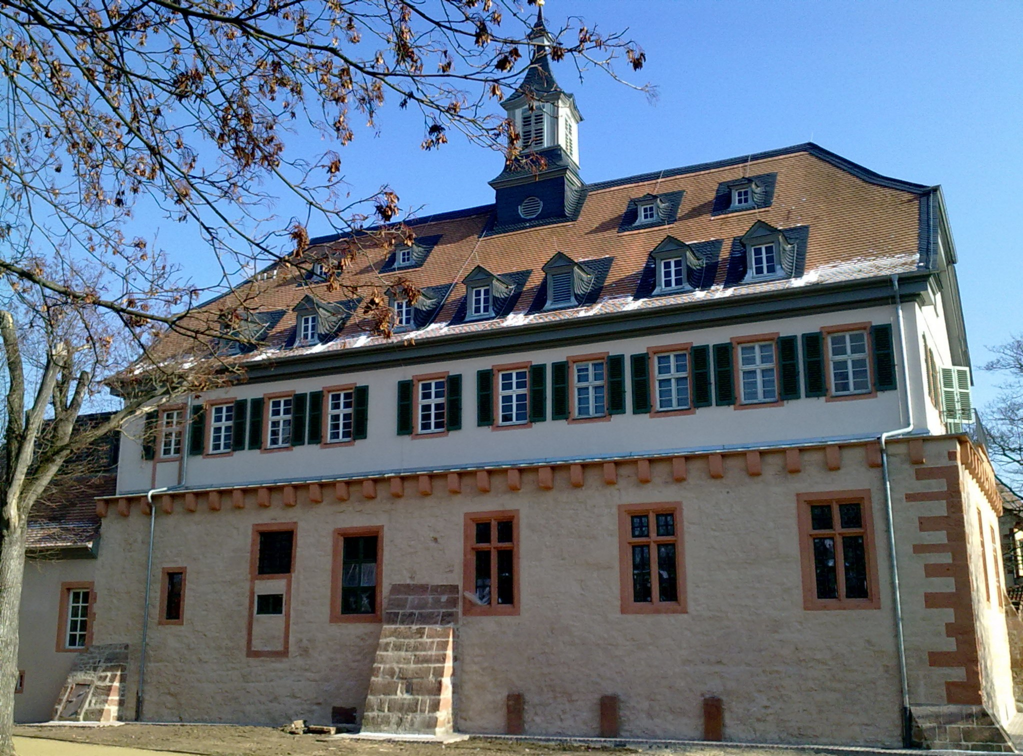 Das frisch renovierte Pfälzer Schloss in Groß-Umstadt mit Blick von Südwesten; das Erdgeschoss war gleichzeitig Stadtmauer; rechts stehen die drei kurpfälzischen Wappensteine.